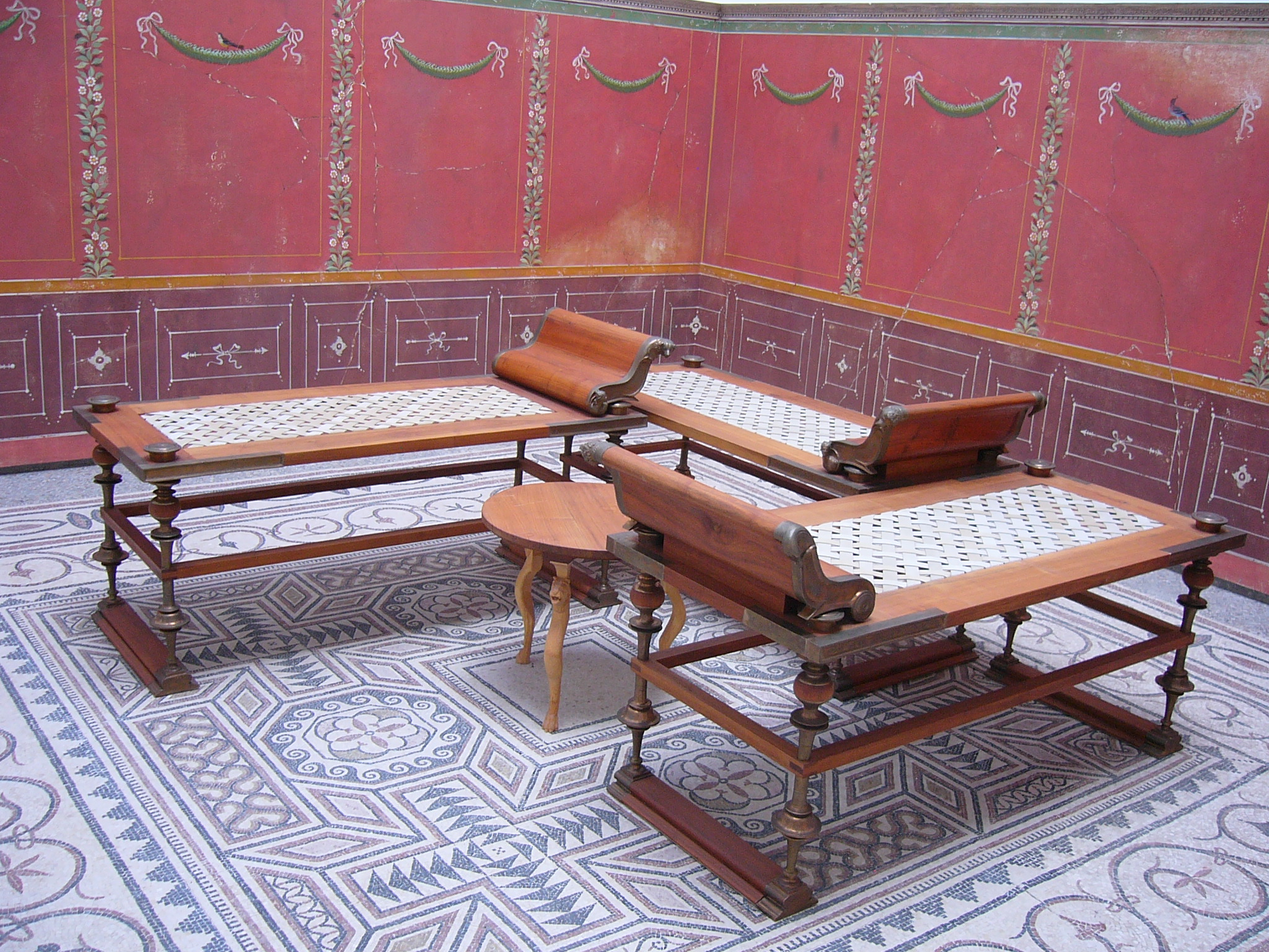 Nachbildung eines Tricliniums (Speisezimmer einer römischen Villa) in der Archäologischen Staatssammlung München aus der Zeit des Römischen Reiches (EG): Klinen (Ruhesofas) in hufeisenförmiger Anordnung zur Essenseinnahme, Rekonstruktion, ca. 80 v. Chr. Bodenmosaik einer römischen Villa (original - Fundort: Kraiburg am Inn, etwa 3. Jh. n. Chr.) Römische Wandmalerei (Rekonstruktion mit Original-Bronzeteilen), kein Schild mit Zeitangabe vorhanden